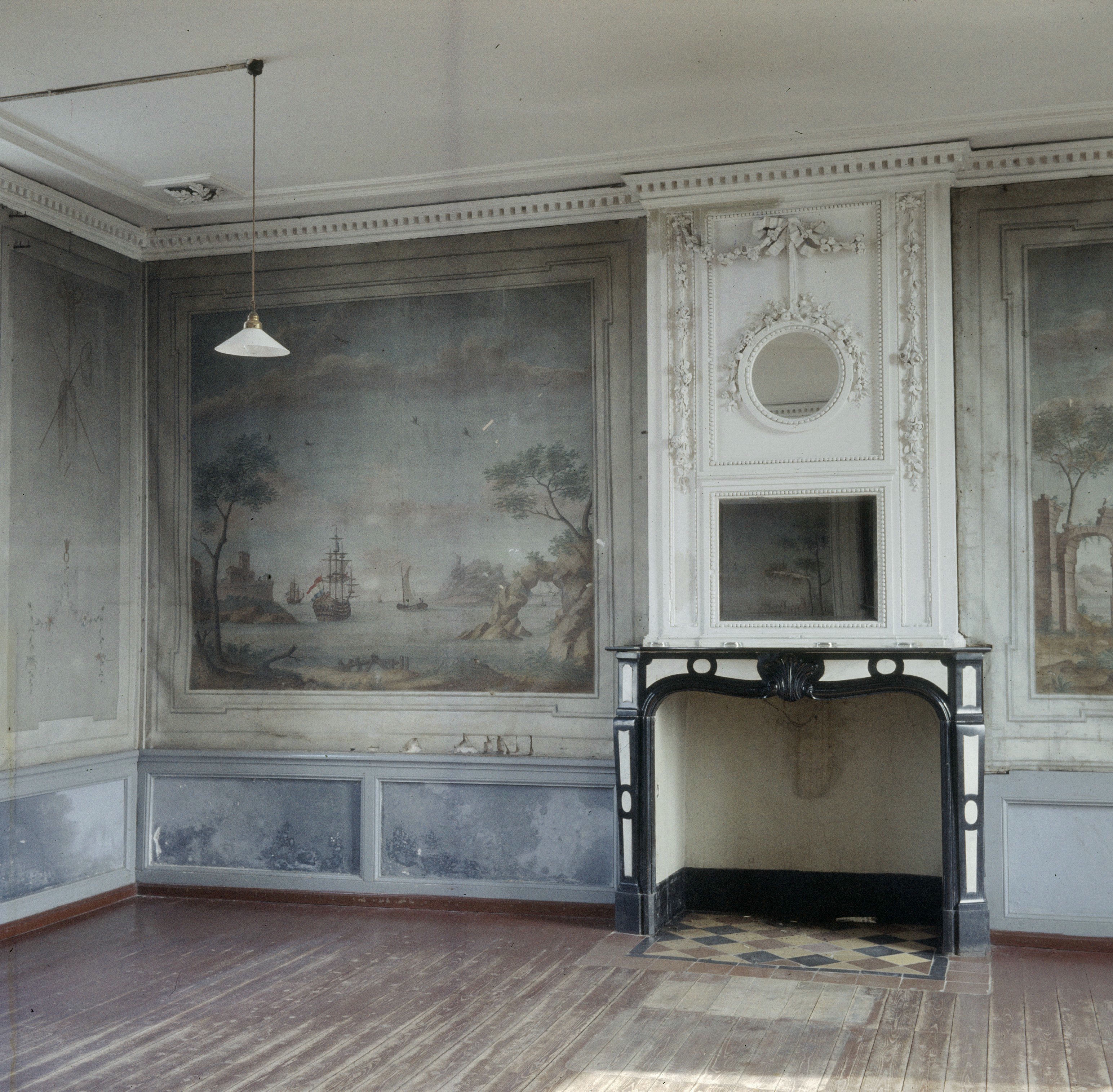 Kasteel Ten Hove: Interieur salon, overzicht met wandschildering en schouw